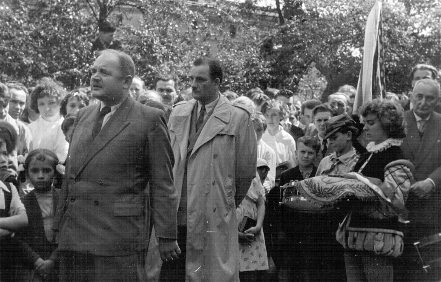 Uroczyste otwarcie Muzeum Regionalnego w Prudniku.